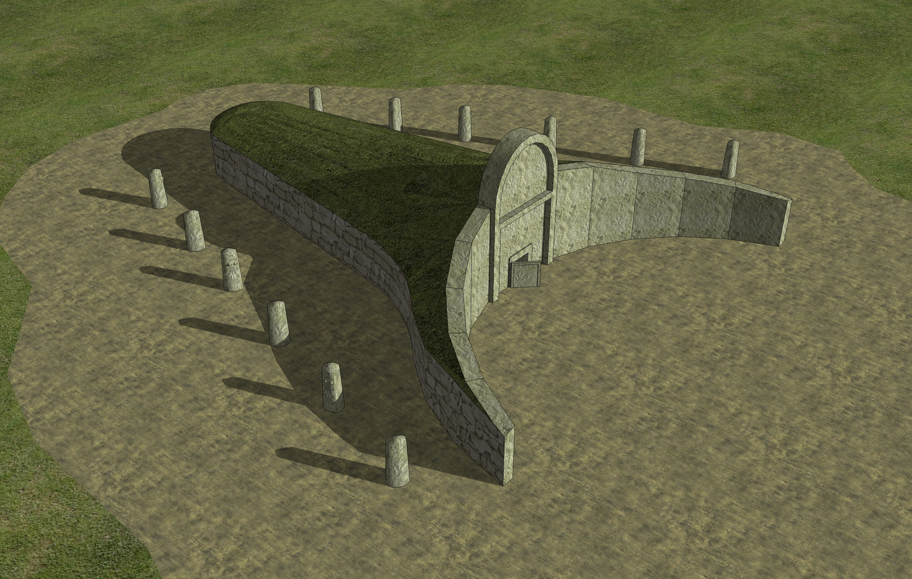 Modello 3D della tipologia di Tomba dei Giganti ad esedra con arco centinato.